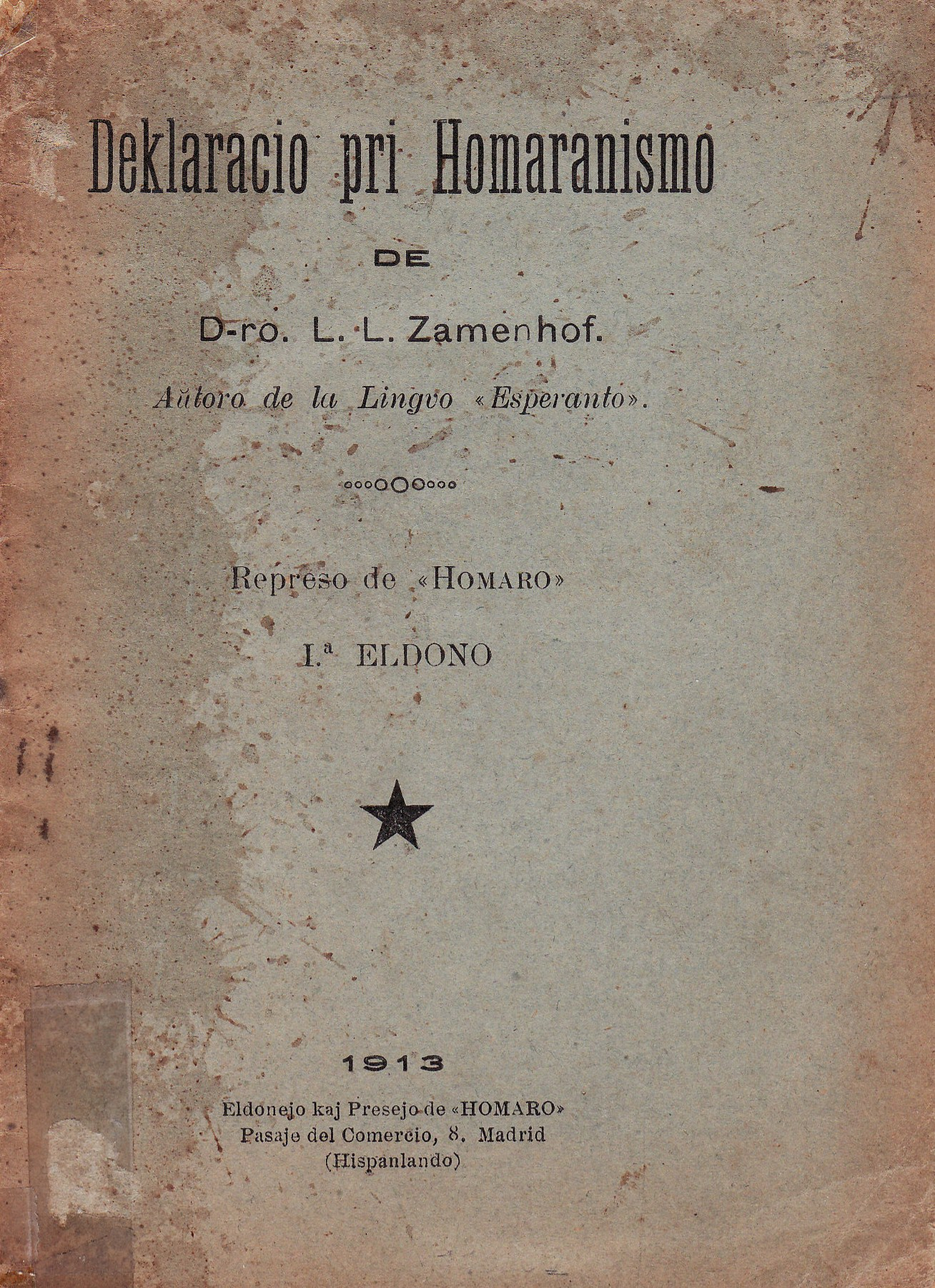 Deklaracio pri Homaranismo